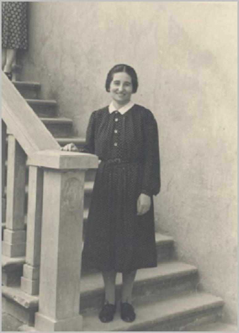 Pielęgniarka i mistyczka Pierina Gilli